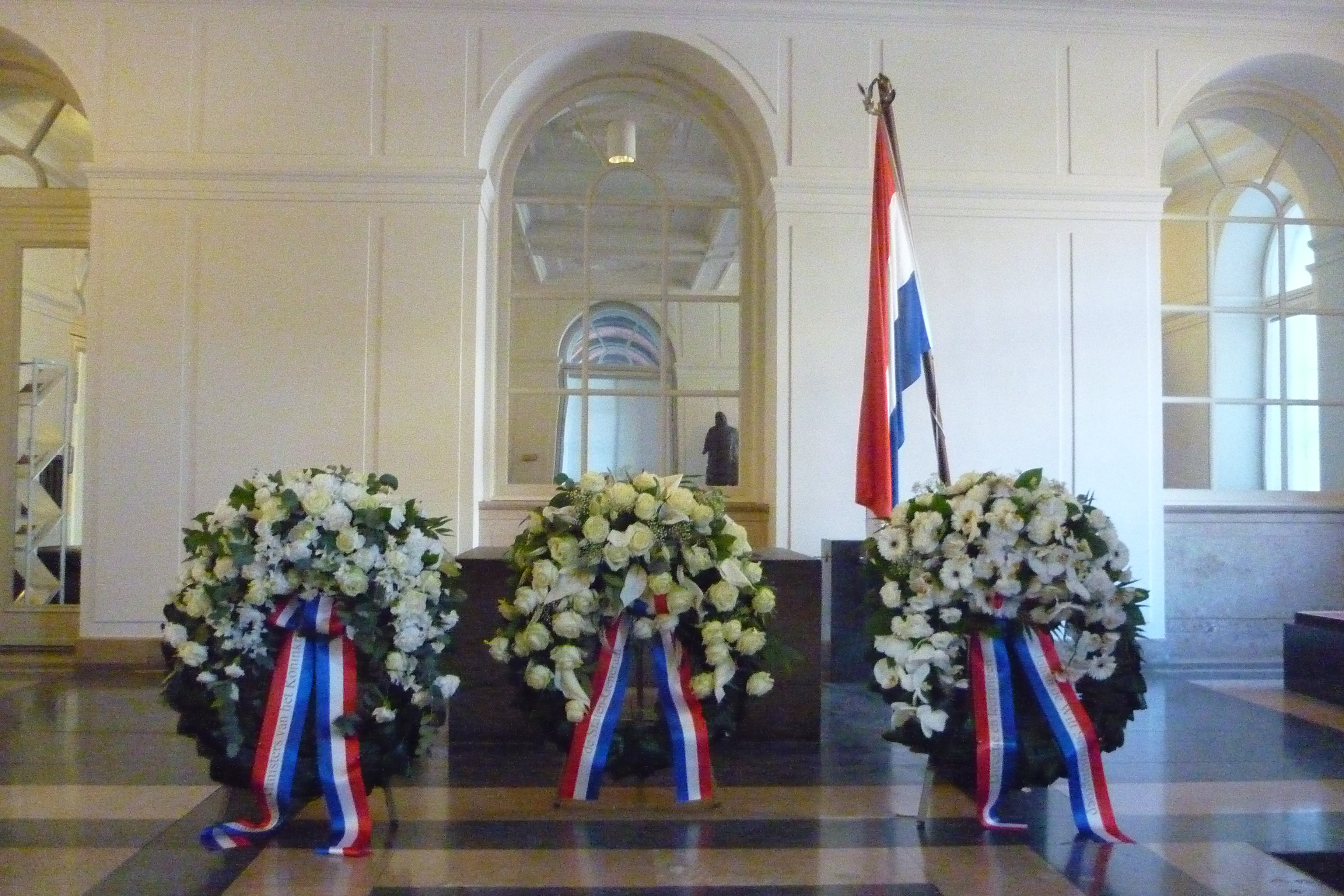 Erelijst van Gevallenen 1940-1945 na de herdenking van 4 mei 2013.